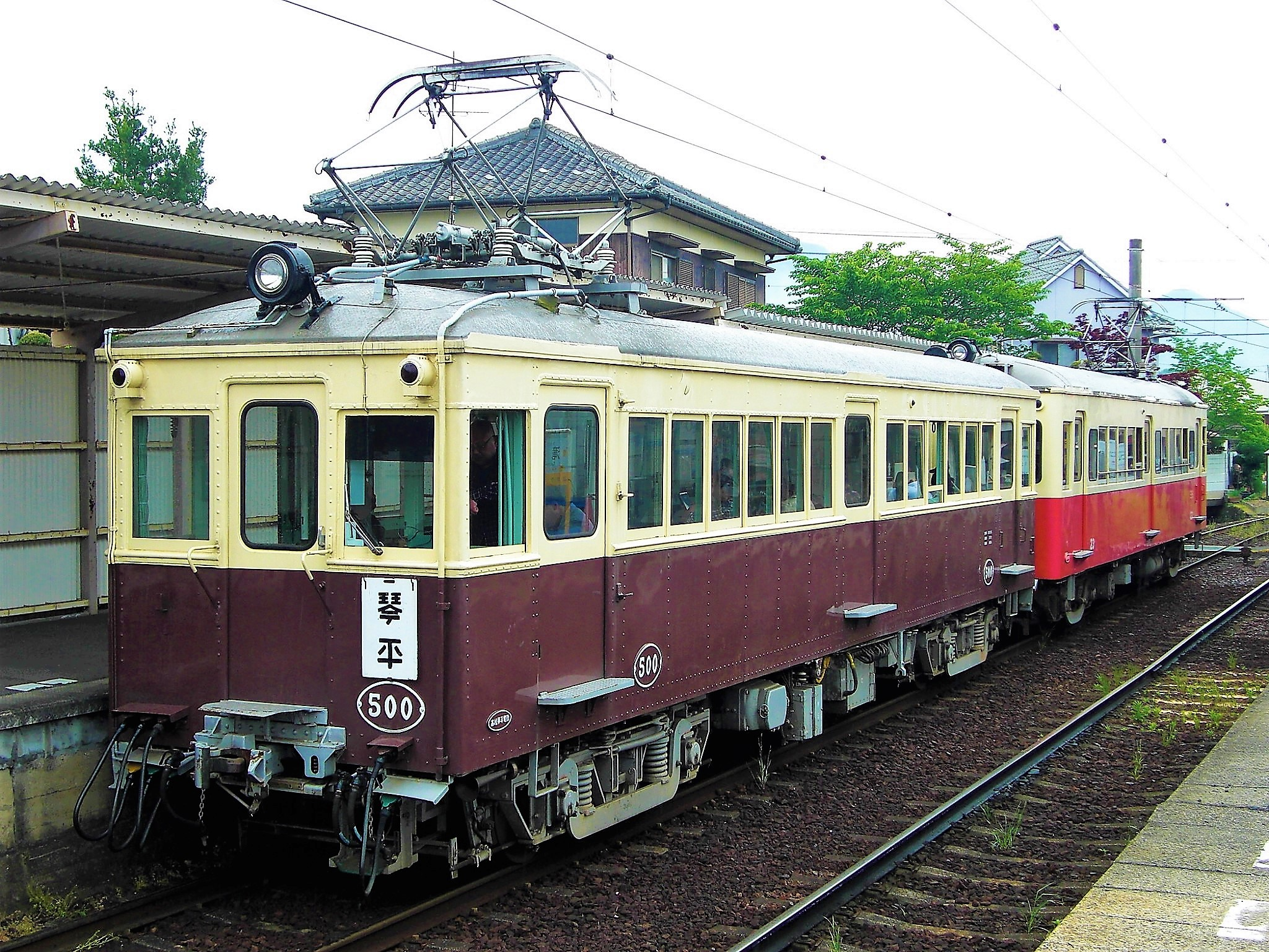 高松琴平電気鉄道5000形電車500号